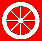 Kerék_(heraldika)